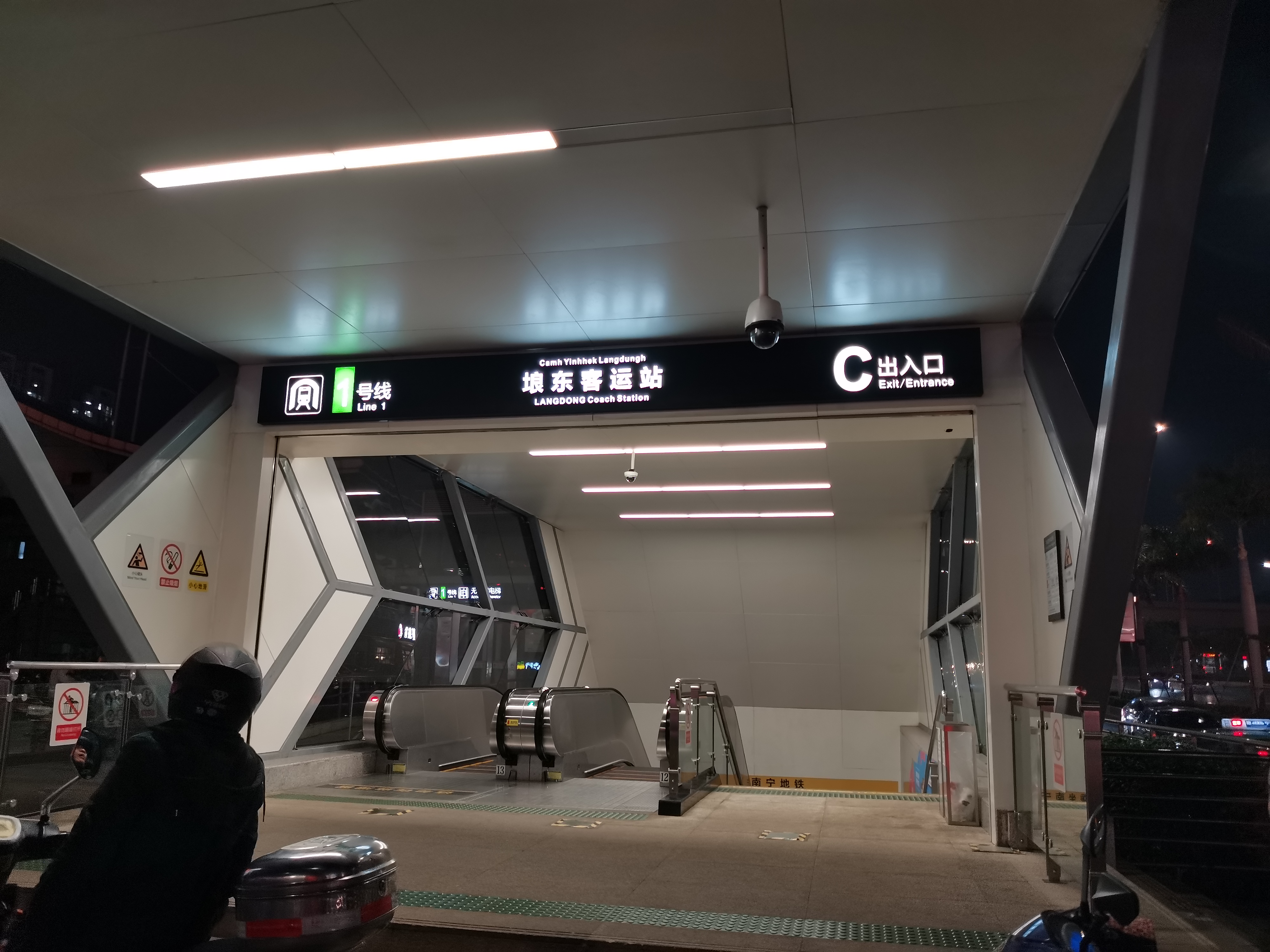 南宁轨道交通青秀山站站厅